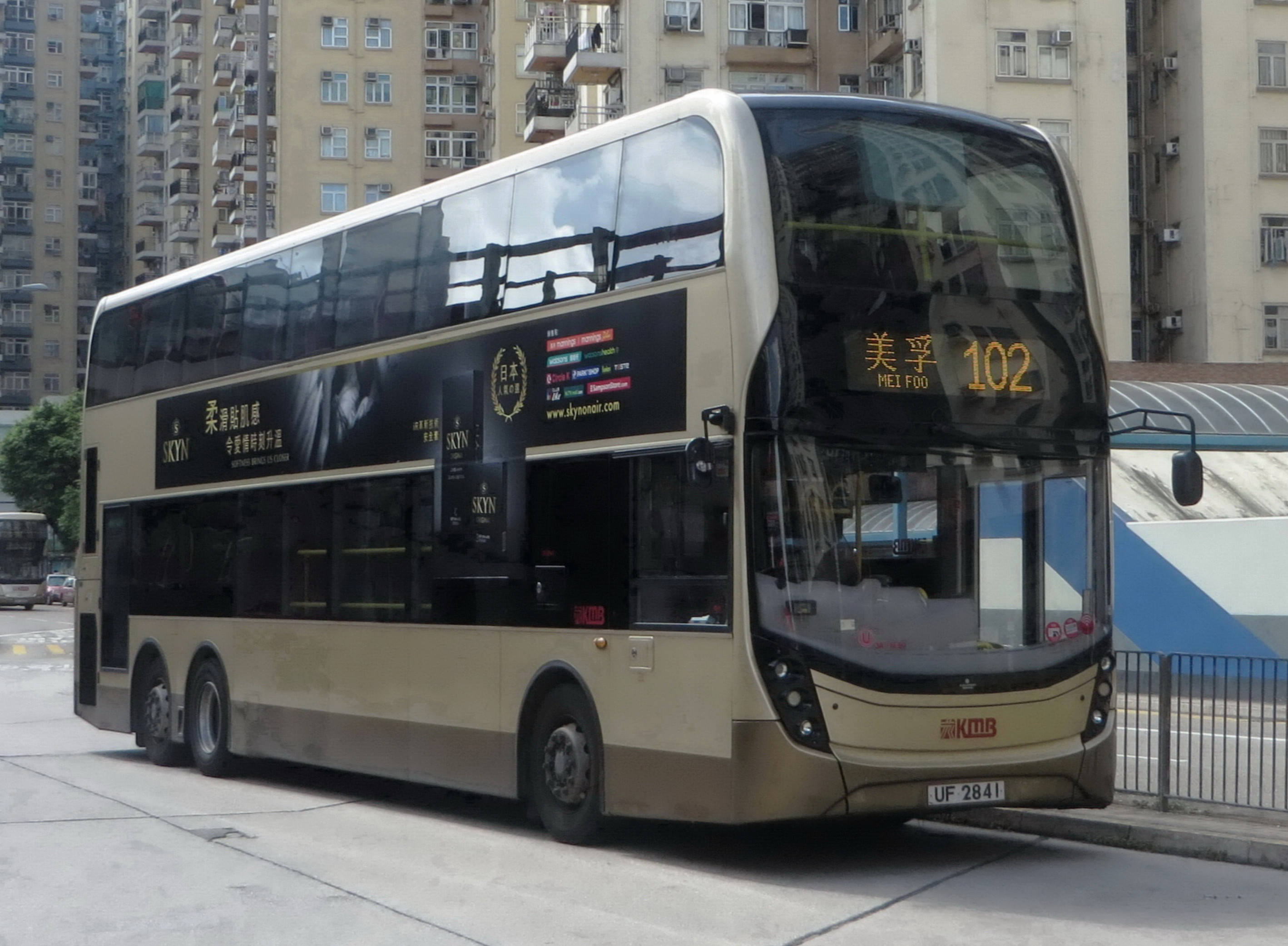 中文（中国大陆）: Trident E500 Turbo 3ATENU99